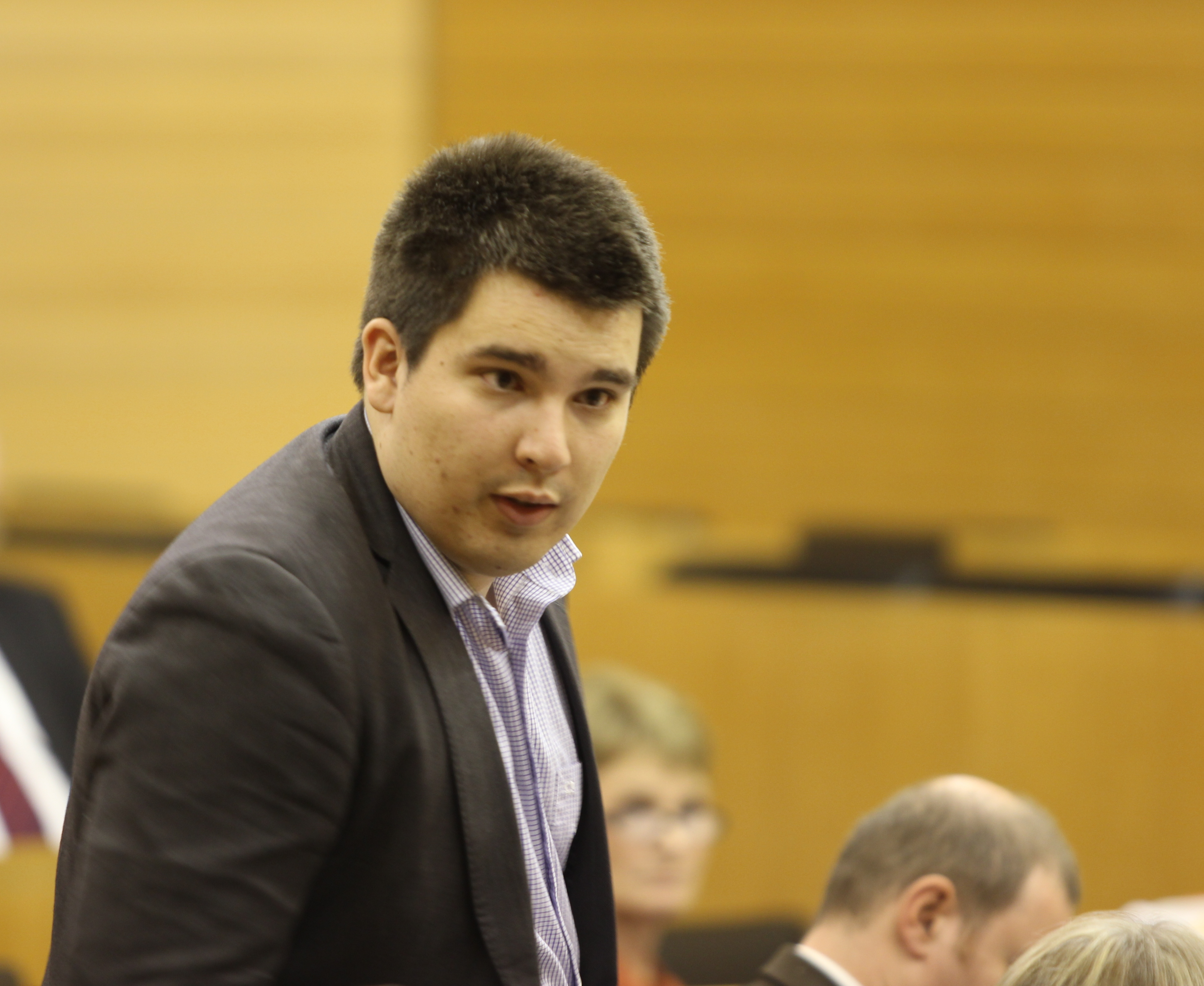 Alexander Salomon Wikipedia im Landtag – Baden-Württemberg 15.–16. Mai 2013 in Stuttgart Fragen zur Nachnutzung Wenn Sie Fragen zur Nachnutzung dieses Bildes haben, können Sie sich jederzeit gern an wenden Personality rights warningAlthough this work is freely licensed or in the public domain, the person(s) shown may have rights that legally restrict certain re-uses unless those depicted consent to such uses. In these cases, a model release or other evidence of consent could protect you from infringement claims.